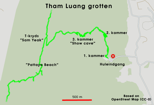 Tham Luang kort over grotten